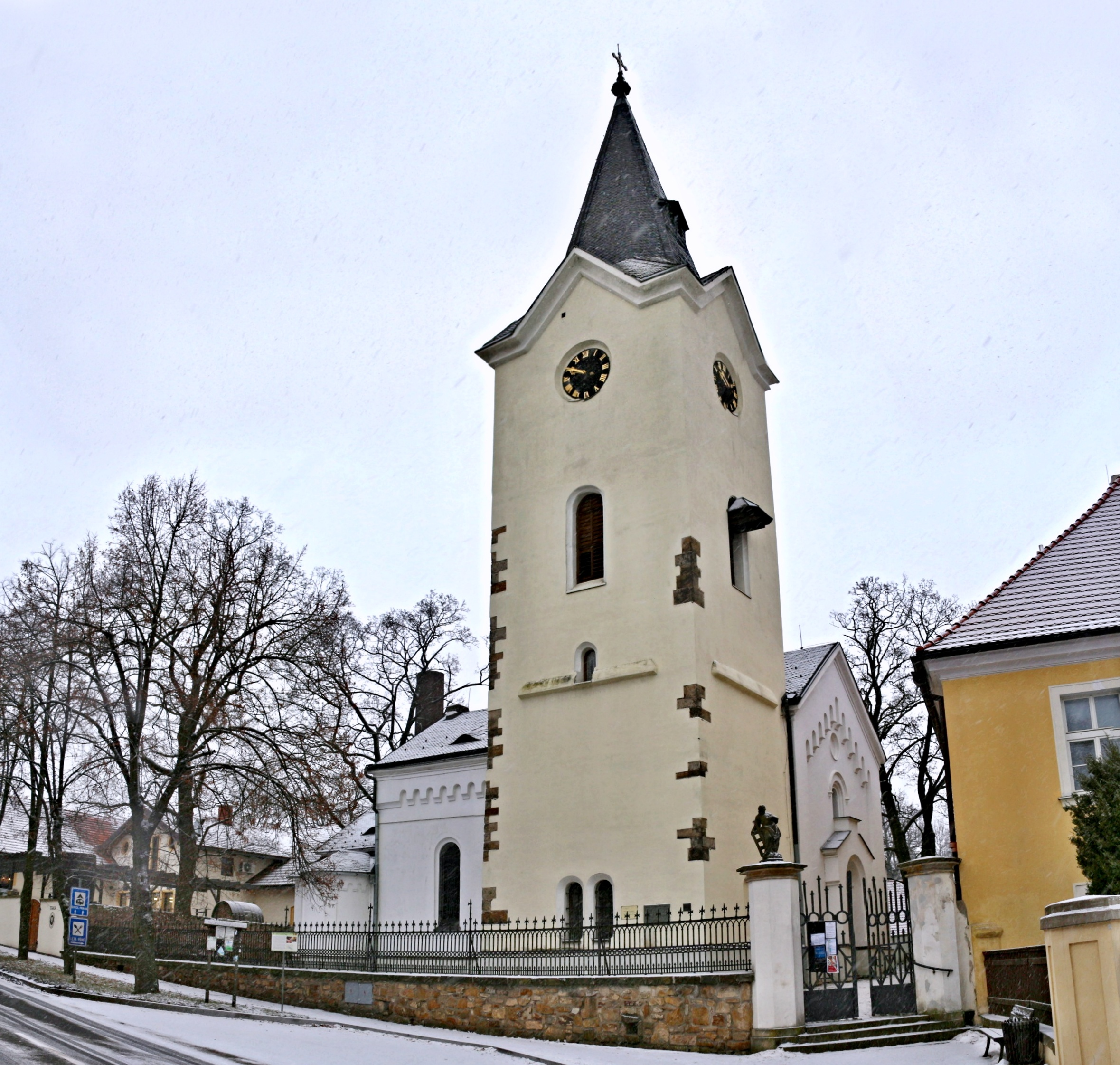 Dolní Počernice, kostel Nanebevzetí Panny Marie